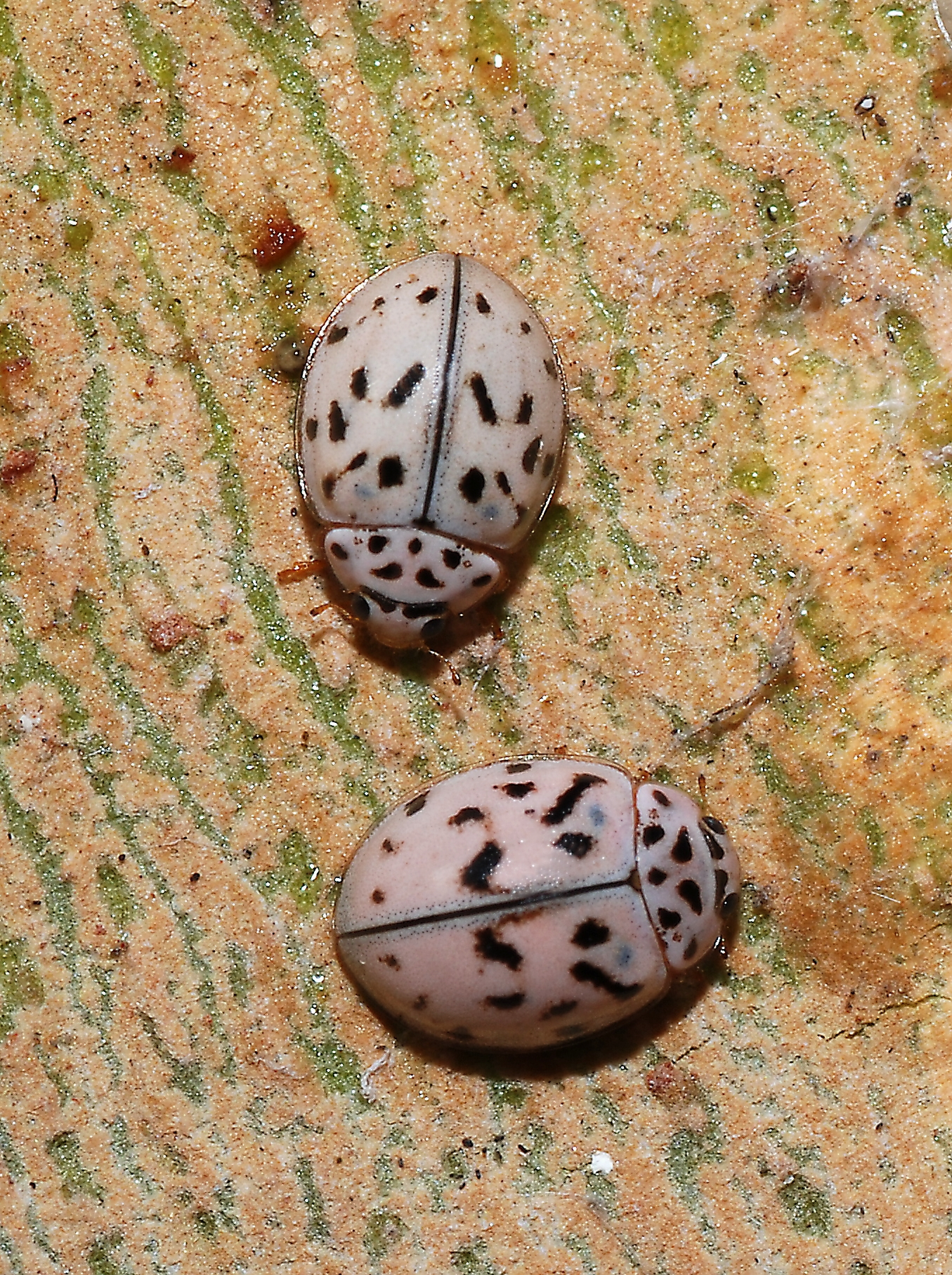 Two ladybirds (Oenopia doublieri)